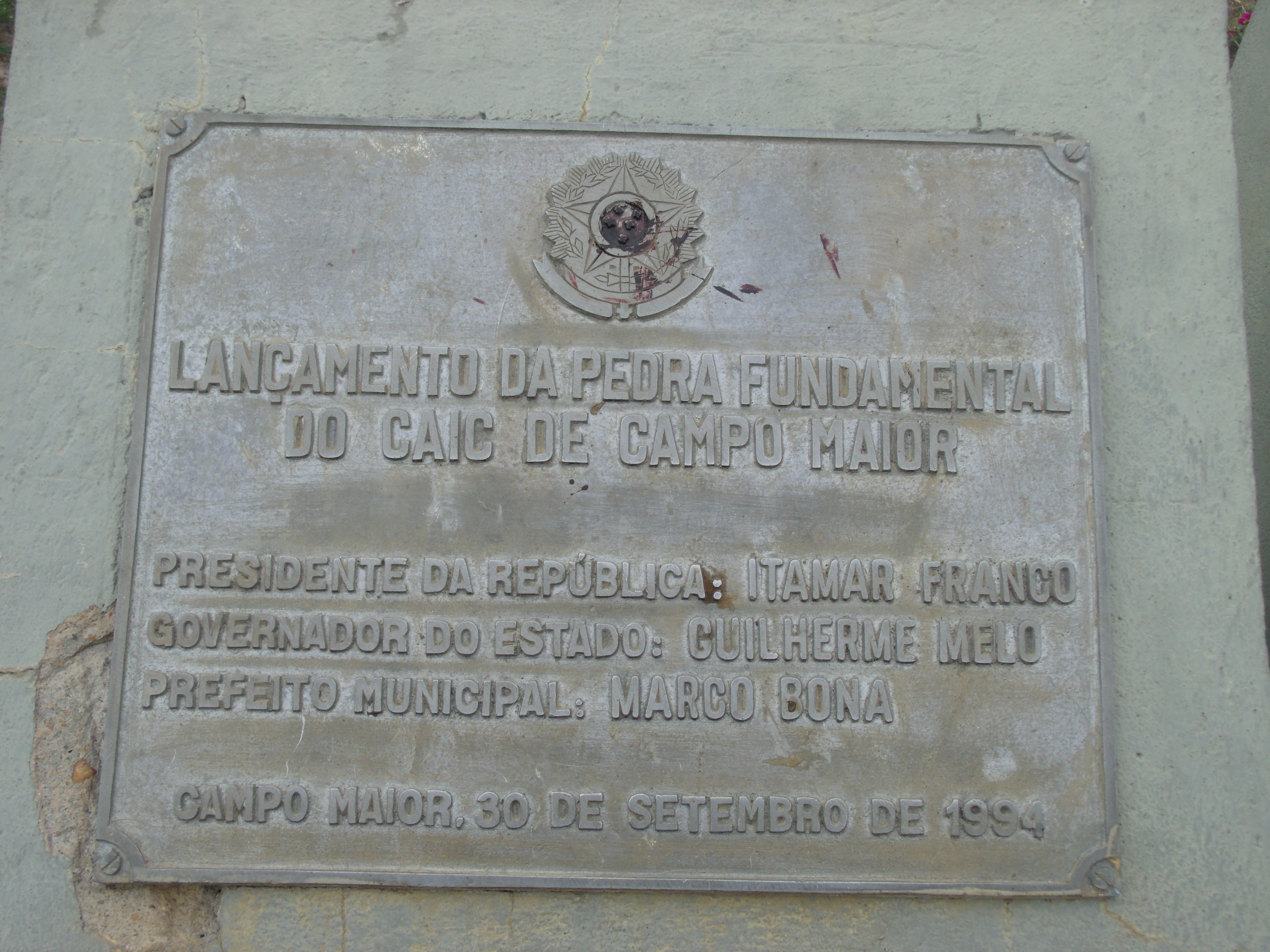 Imagem aproximada da pedra fundamental da construção do palácio escolar do CAIC em Campo Maior,Piauí